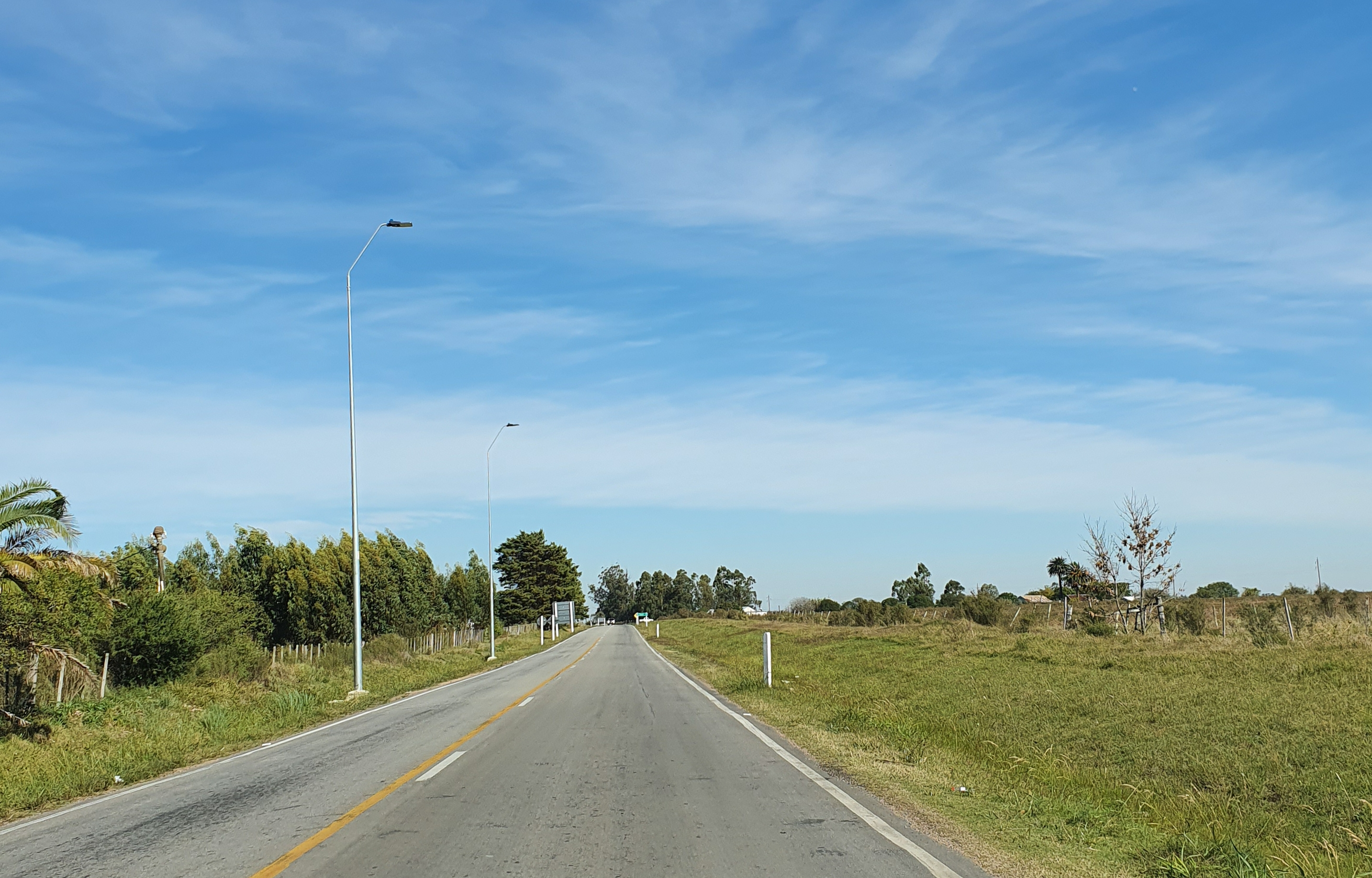 Ruta 6 km 50.800 próximo a ruta11, departamento de Canelones, Uruguay.